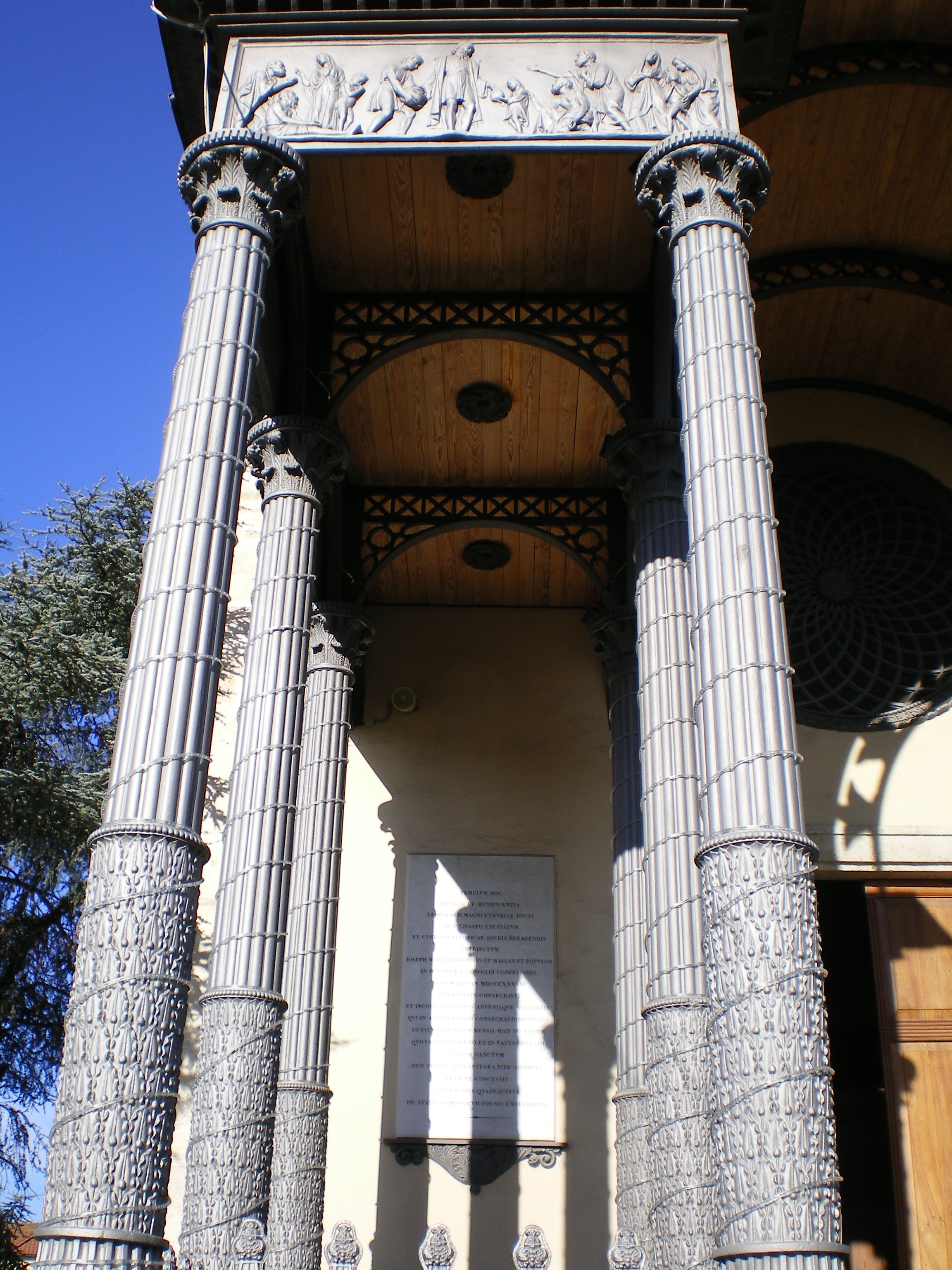 Colonne del Pronao della Chiesa di San Leopoldo, Follonica